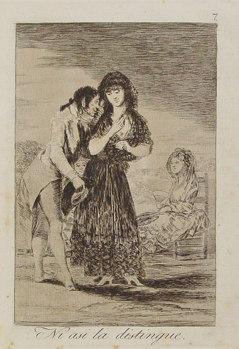 Serie de Los Caprichos